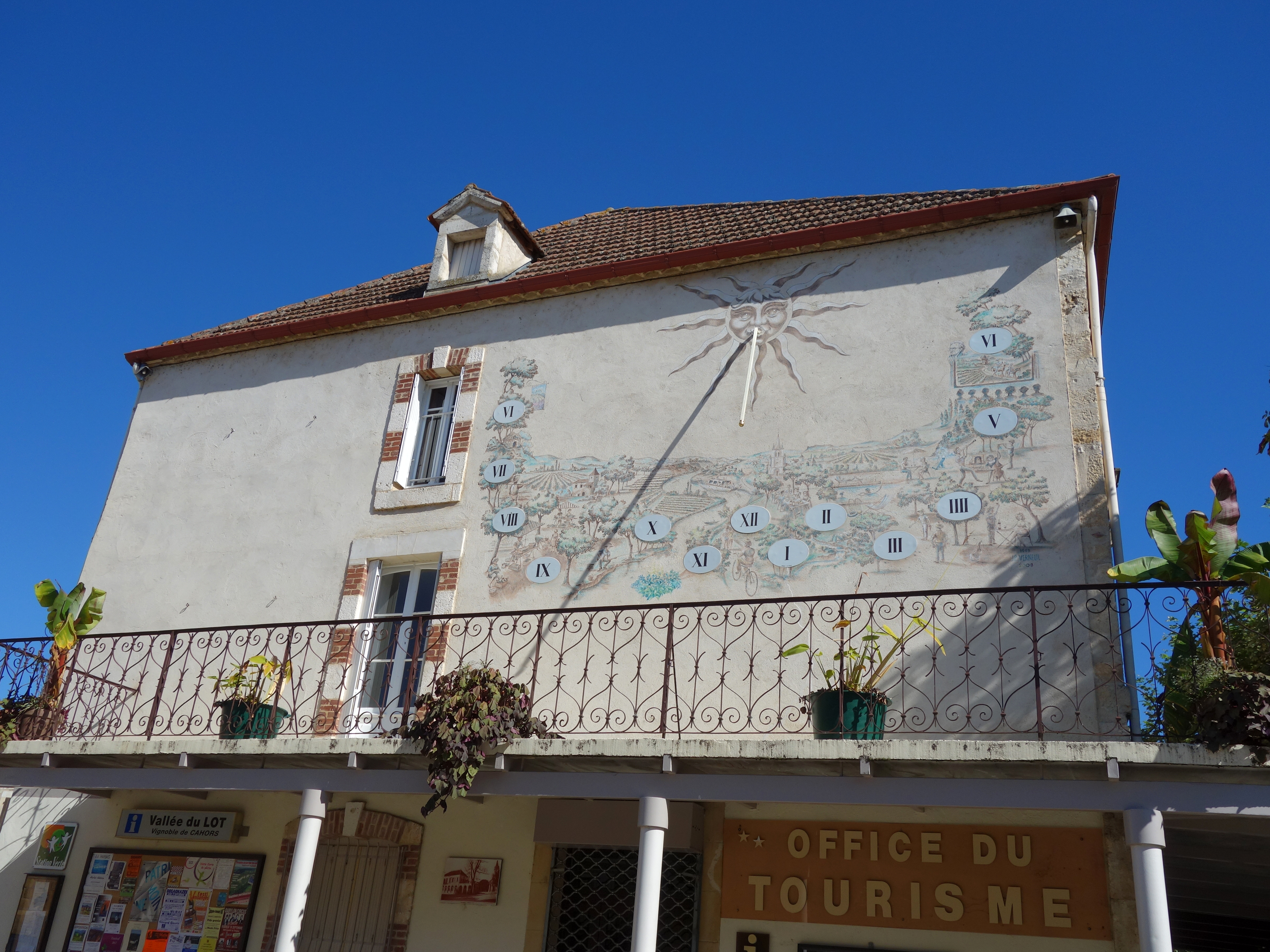 Un cadran solaire exceptionnel !